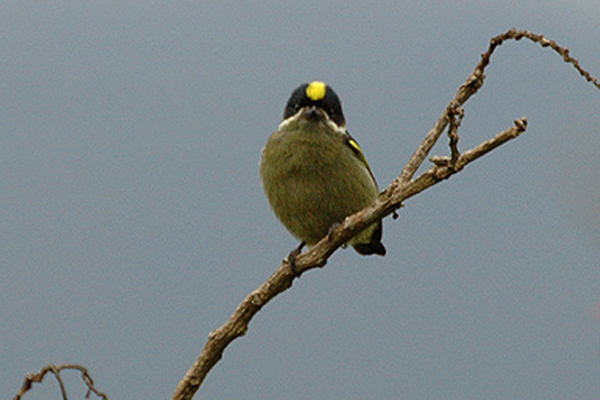 Uganda Western Green Tinkerbird (Pogoniulus coryphaeus) Mt Sabinyo, Mgahinga NP Jan 2006